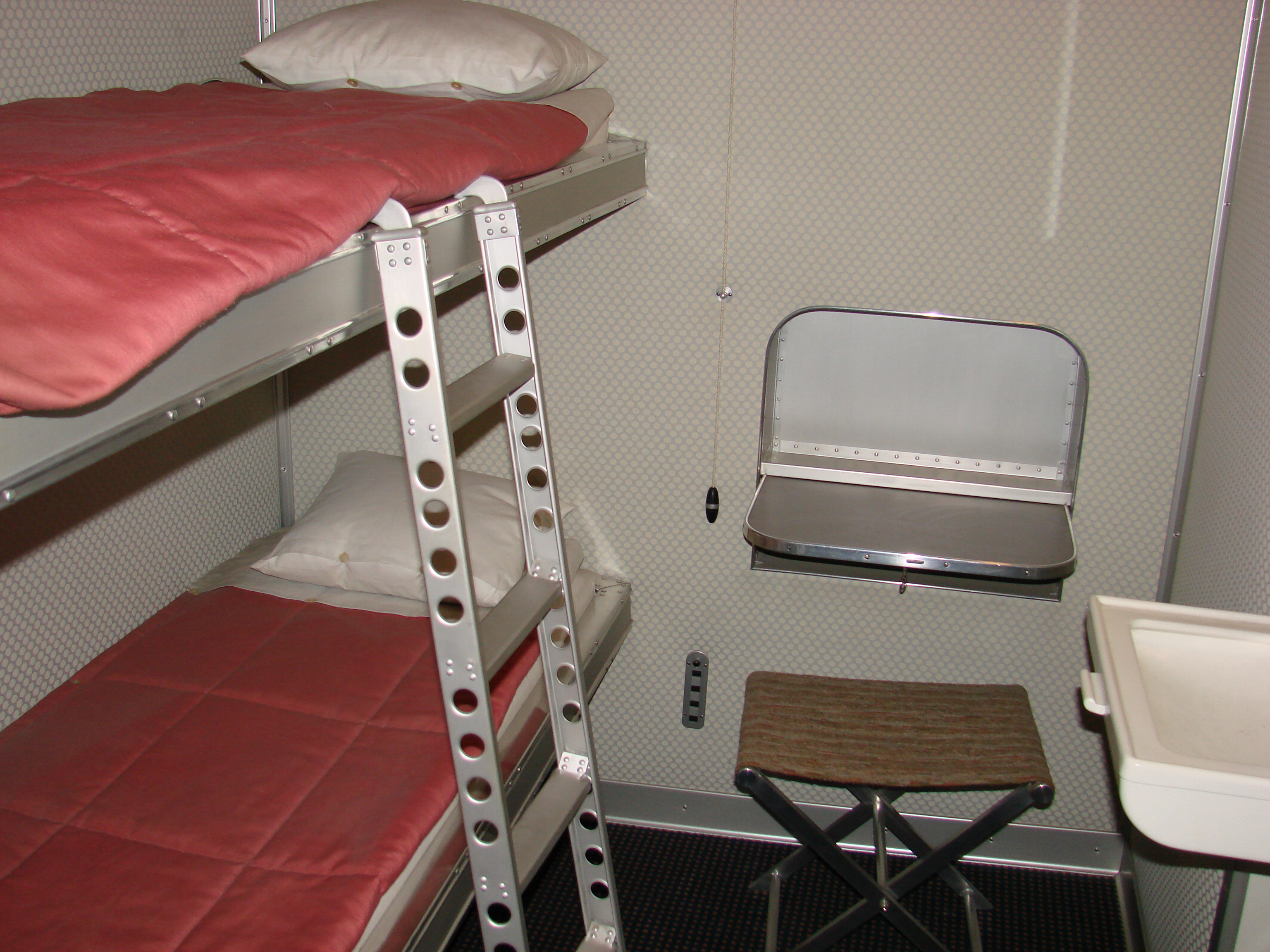 Innenansicht einer Luftschiffkabine. Das Bild stammt aus dem Zeppelinmuseum Friedrichshafen.